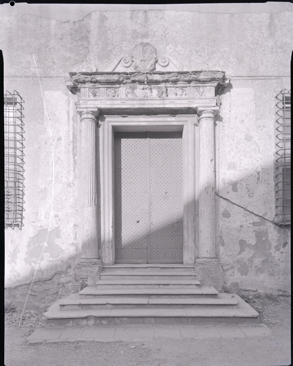 Servizio fotografico : Genova, 1963 / Paolo Monti. - Buste: 2, Fototipi: 2 : Negativo b/n, gelatina bromuro d'argento/ pellicola ; 10x12. - ((Serie costituita da 2 buste sciolte di negativi identificati con i nn.: 7354, 7355. - Il negativo identificato con il numero 46397 è stato realizzato per Zodiac. - Occasione: Documentazione per la pubblicazione: Italia Nostra (a cura di), "Le ville genovesi", catalogo della mostra, Genova 1962, Genova, Comune di Genova, 1967. - Fonte: Monografia di Italia Nostra (a cura di): Le ville genovesi, catalogo della mostra, Genova 1962, Genova, Comune di Genova (1967). - Fonte: Lettera di Paolo Monti: I. Carteggi/ Genova - Enrico (1963-1966), presso Archivio Paolo Monti. Camicia con documenti dattiloscritti e manoscritti vari relativi al lavoro eseguito per Italia Nostra: preventivi, lettere, inventari. - Fonte: Rubrica di Paolo Monti: Archivio fino 1-4-1961/ 31-3-1963 (1961-1963), presso Archivio Paolo Monti. - Fonte: Agenda di Paolo Monti: R 1 - Monti/ 1 aprile 1963 - 6 giugno 1964/ 6000-8193 (1963-1964), presso Archivio Paolo Monti